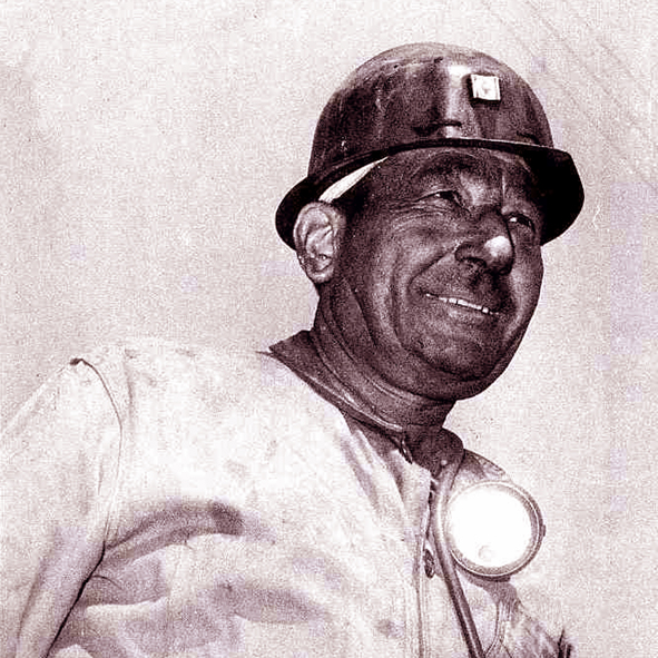 Mineur au casque vers 1950